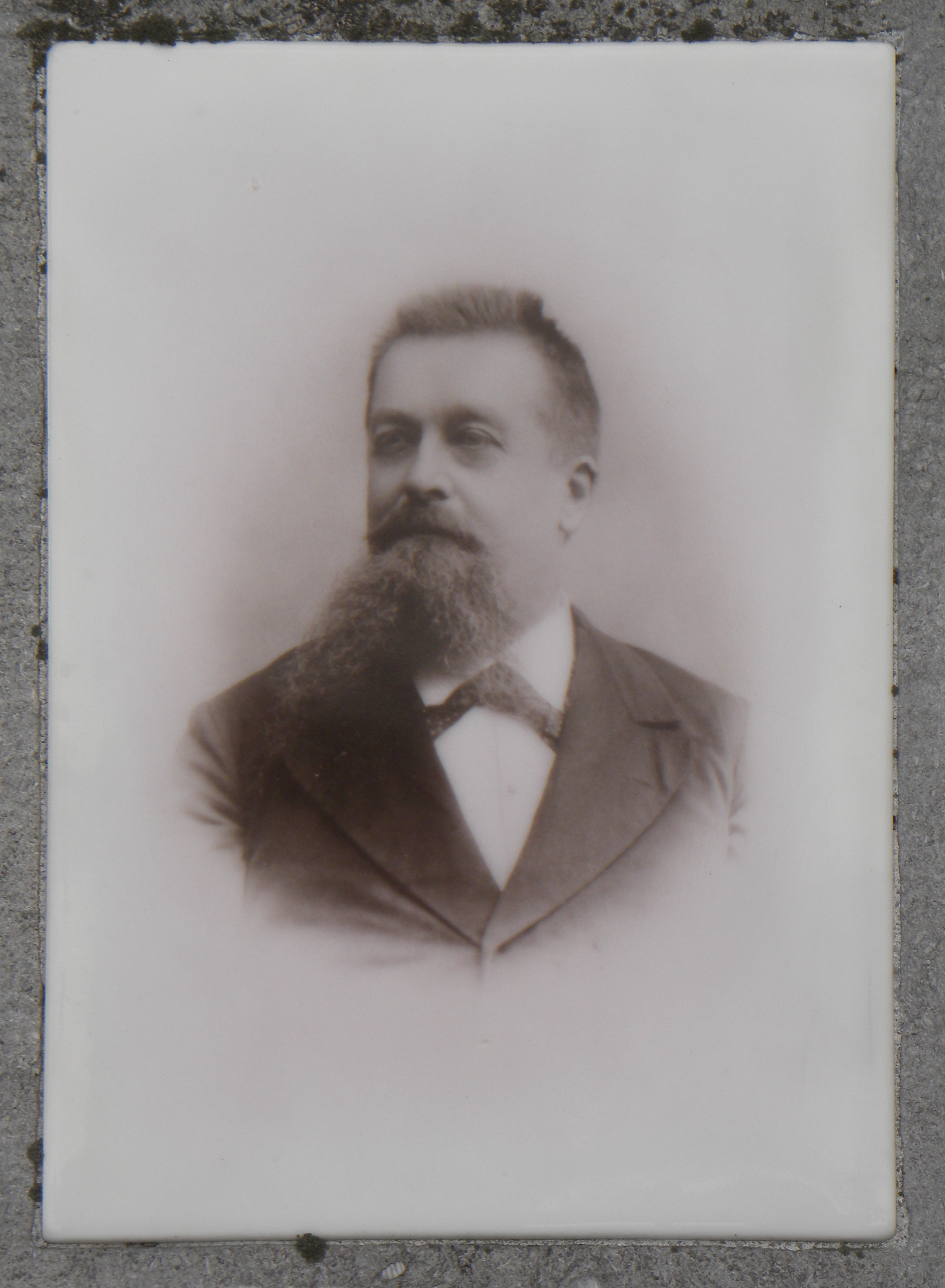 Portrait de Mr Jules DEMOLDER (1840-1902), citoyen de Court-St-Etienne et bourgmestre de cette commune de 1879 à 1895. Photo figurant sur son monument funéraire au cimetière commuinal.